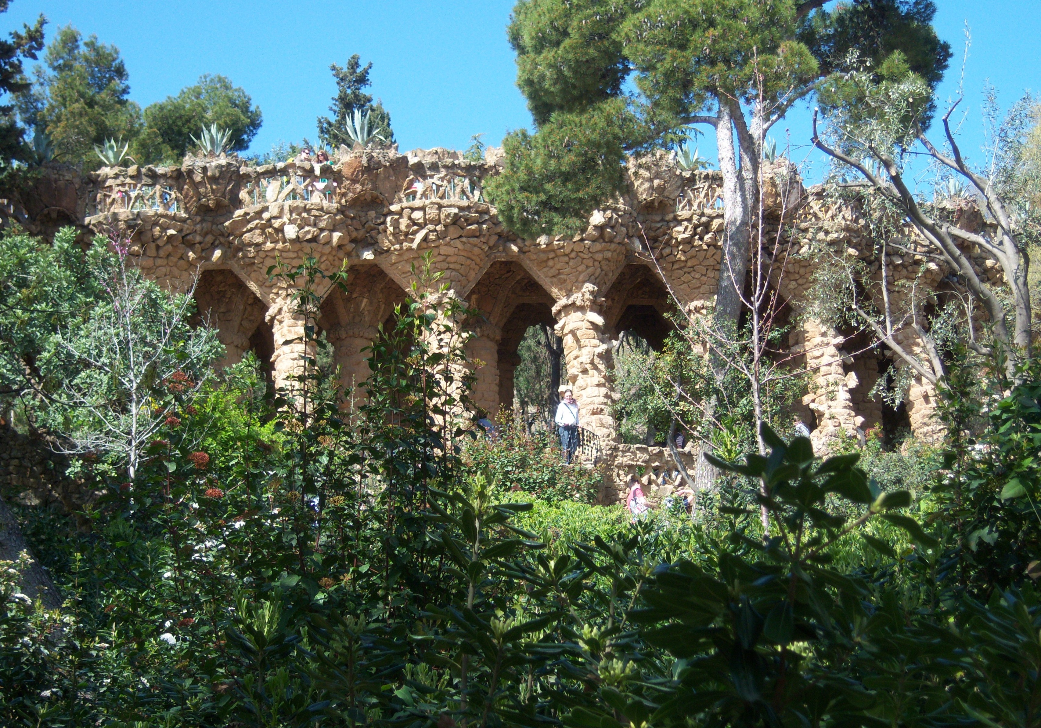 Parque Güell, en Barcelona